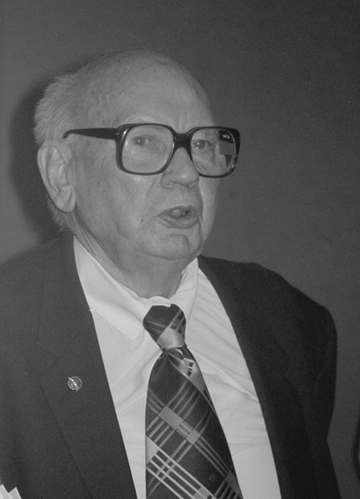 Edvin Brorsson (1899–1988) vid Akvariets Dag 1975